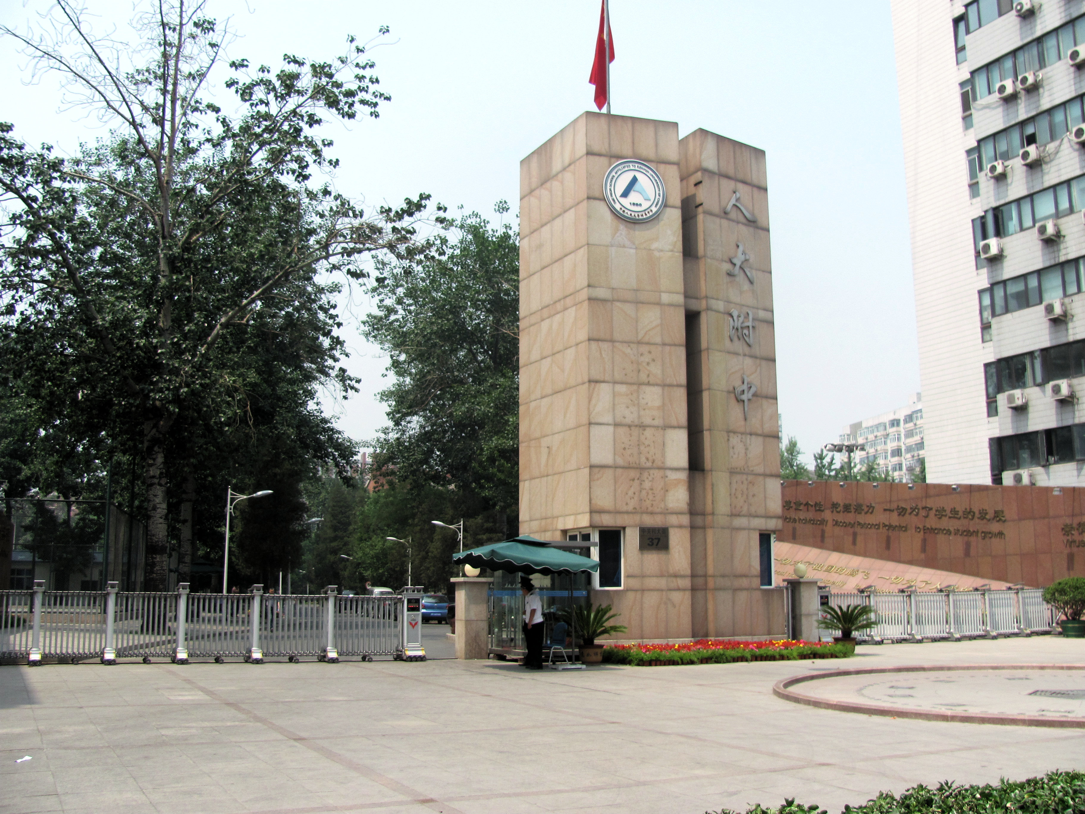 人民大学附属中学